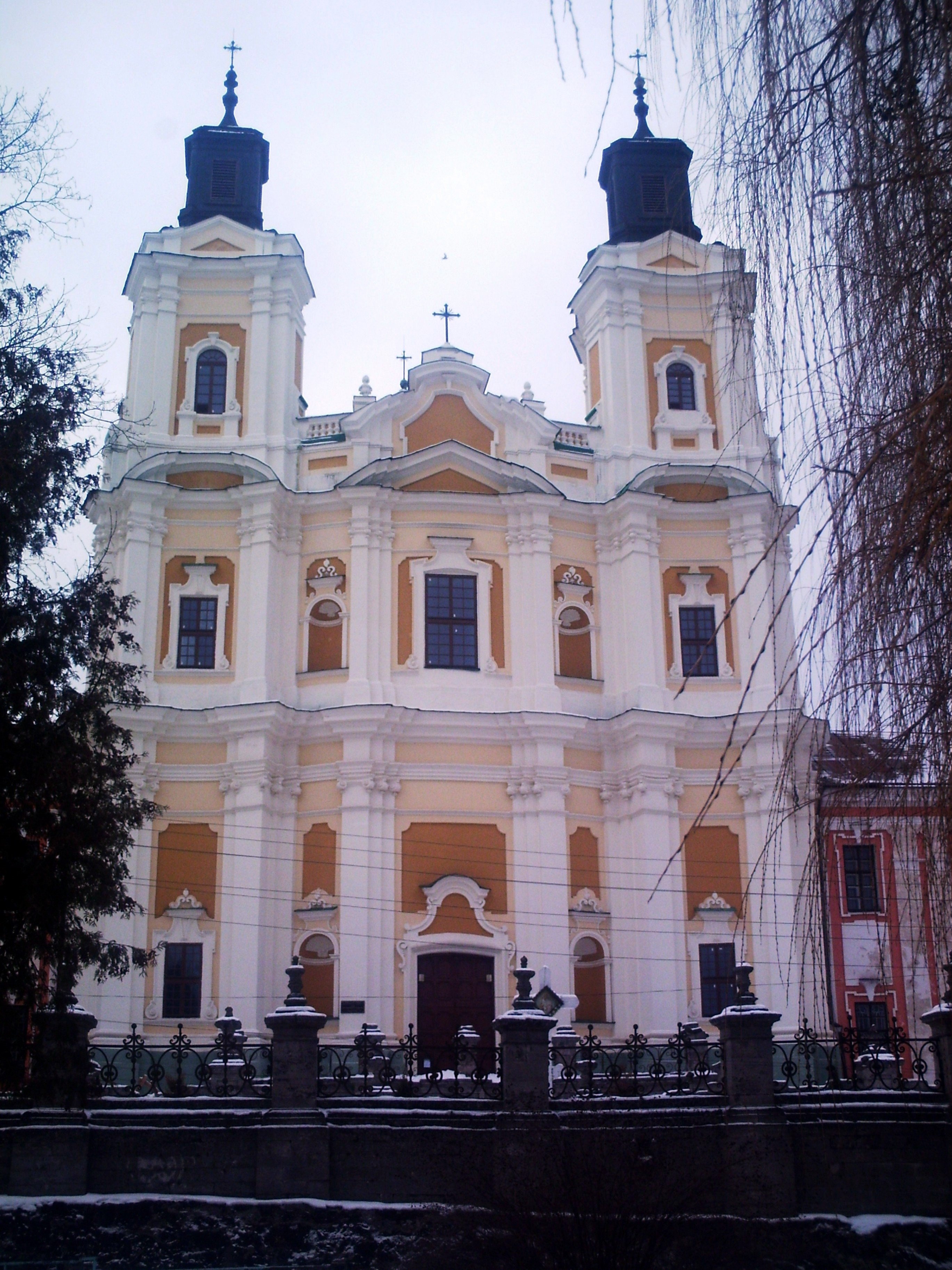 Роки будівництва 1731-1753